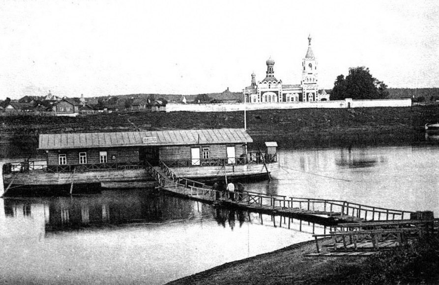 храм в Орше